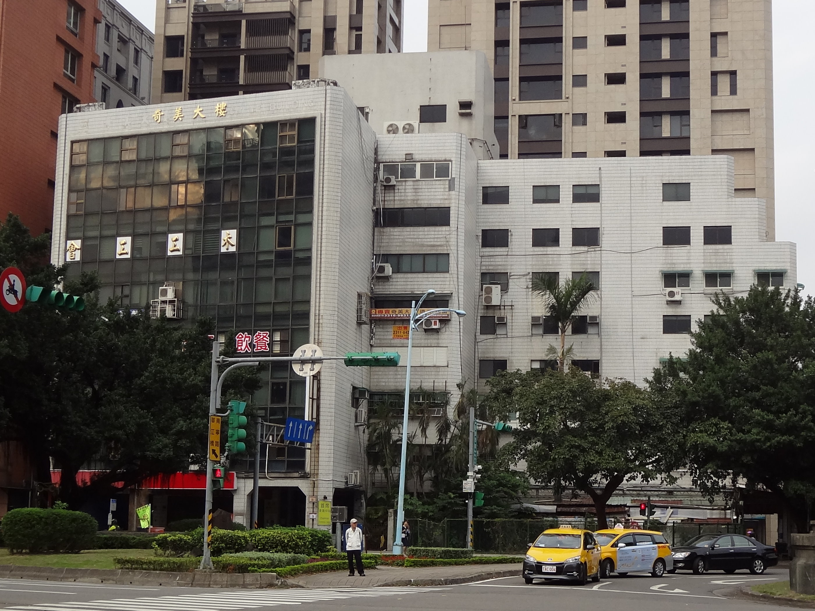 奇美大樓，位於臺北市中正區愛國西路9號。